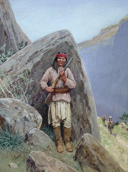 L'embuscade. Gouache.title QS:P1476,fr:"L'embuscade. Gouache." label QS:Lfr,"L'embuscade. Gouache."